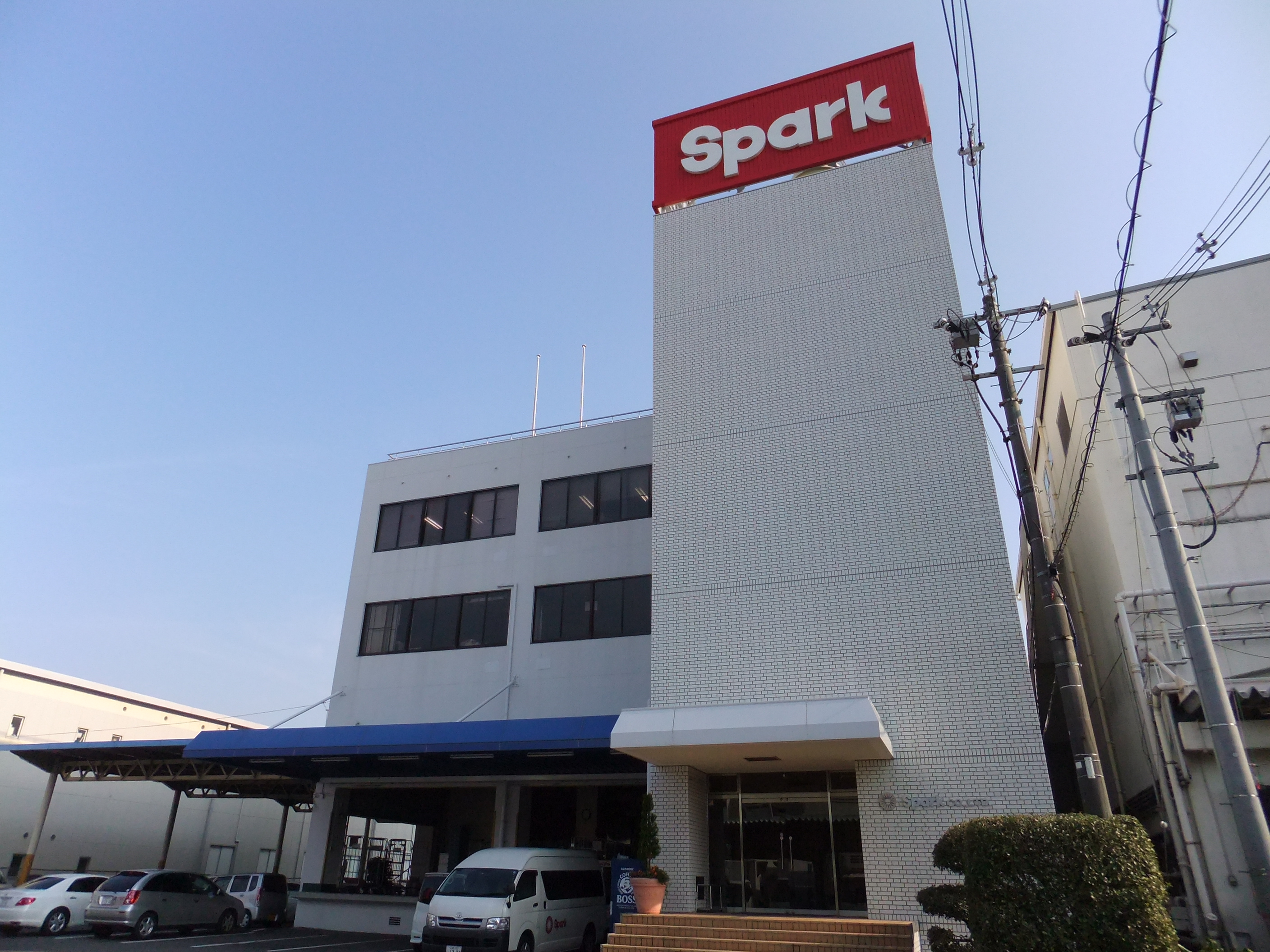 スパーク本社